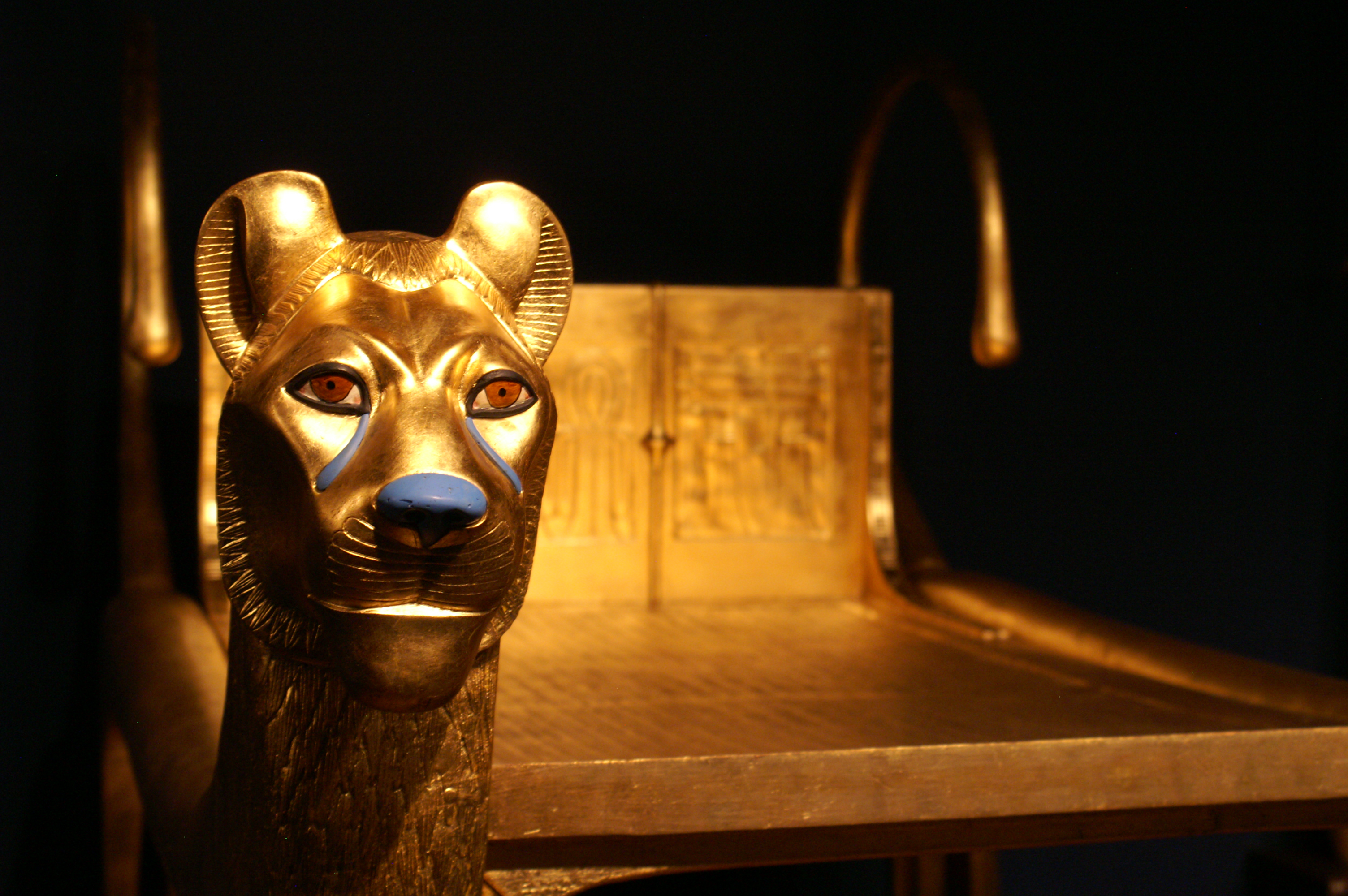 Detail des Löwengestaltigen Ritualbettes aus dem Grab Tutenchamuns, Nachbildung